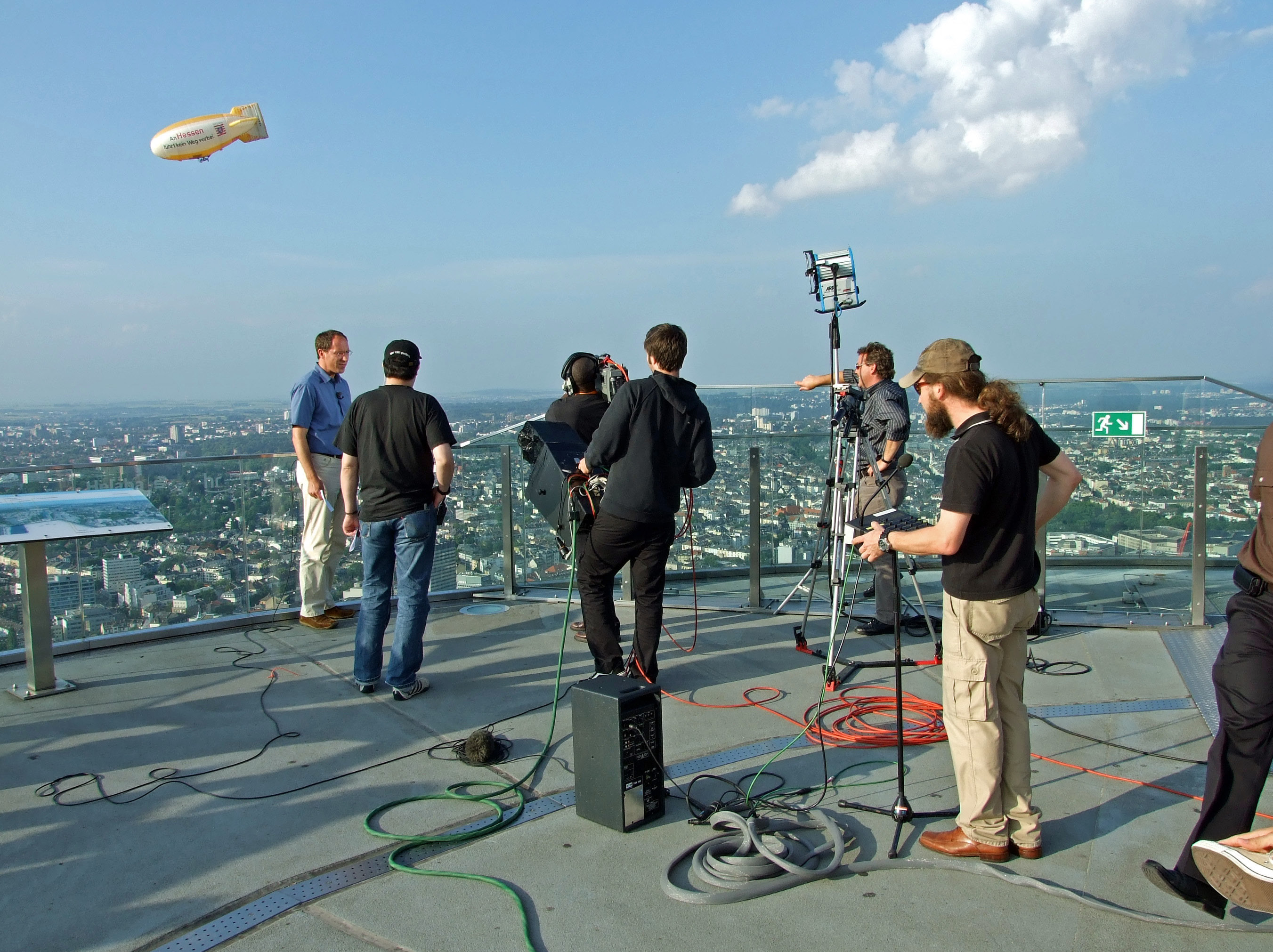 Aufnahme und Aufzeichnung zu "allewetter" auf dem MAIN TOWER